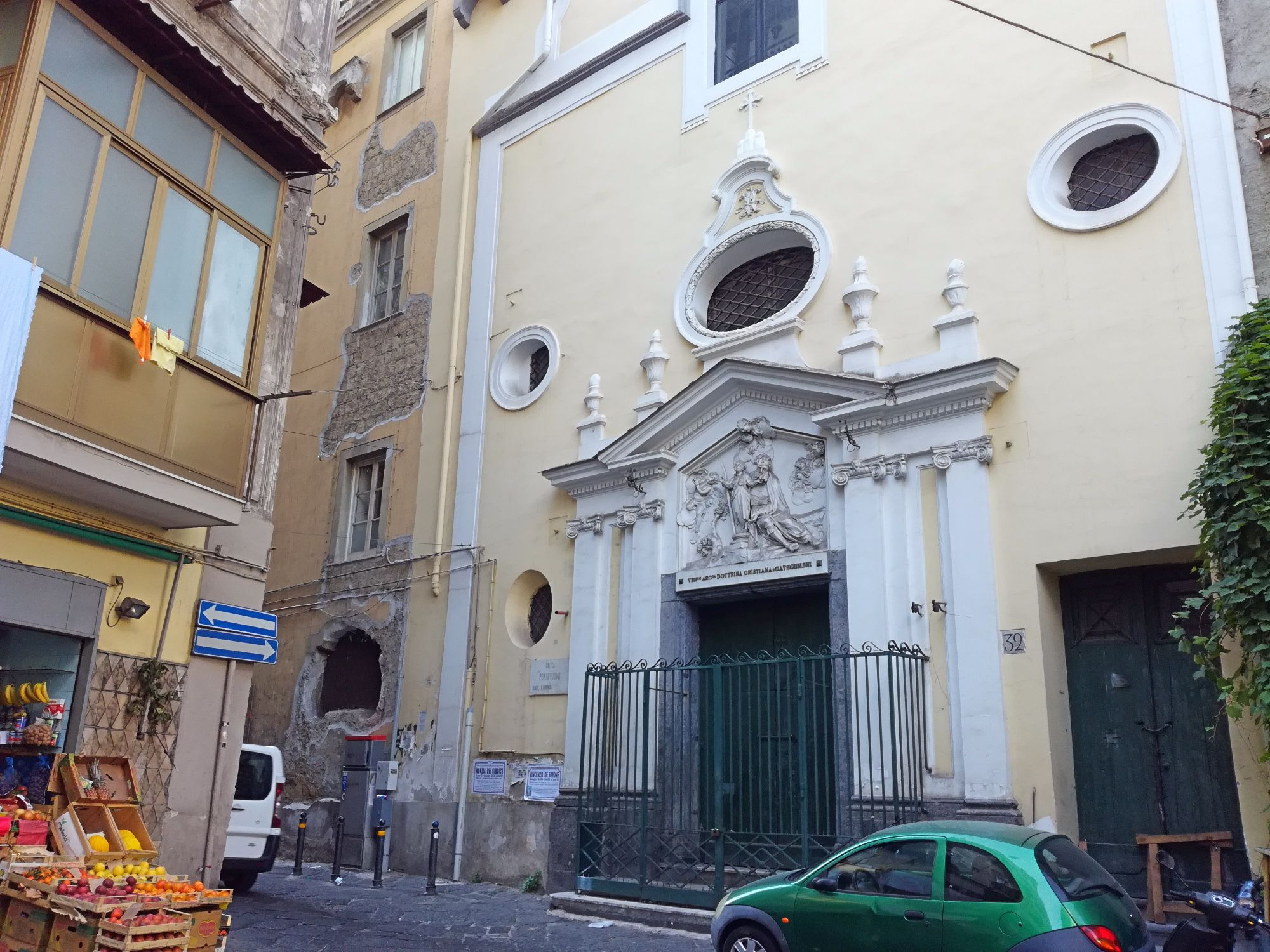 Chiesa di San Gioacchino a Pontenuovo (Napoli)